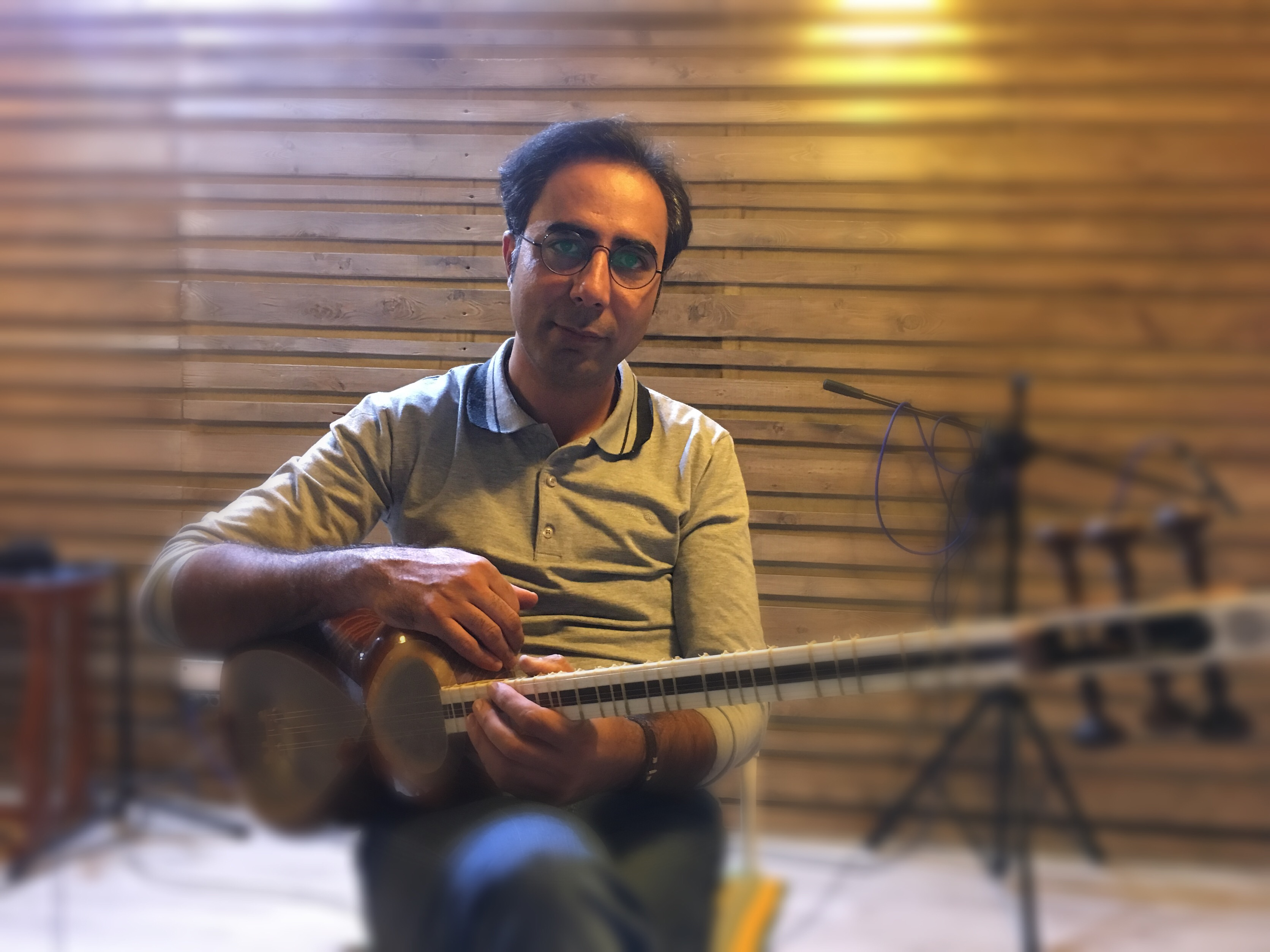 بهزاد رواقی (نوازنده تار) ۱۸ مهر ۱۳۹۶ استودیو مدرن تهران